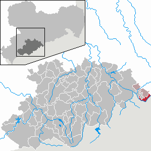 Deutschneudorf im Erzgebirgskreis, Sachsen